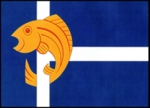 Vlajka Úhřetické Lhoty